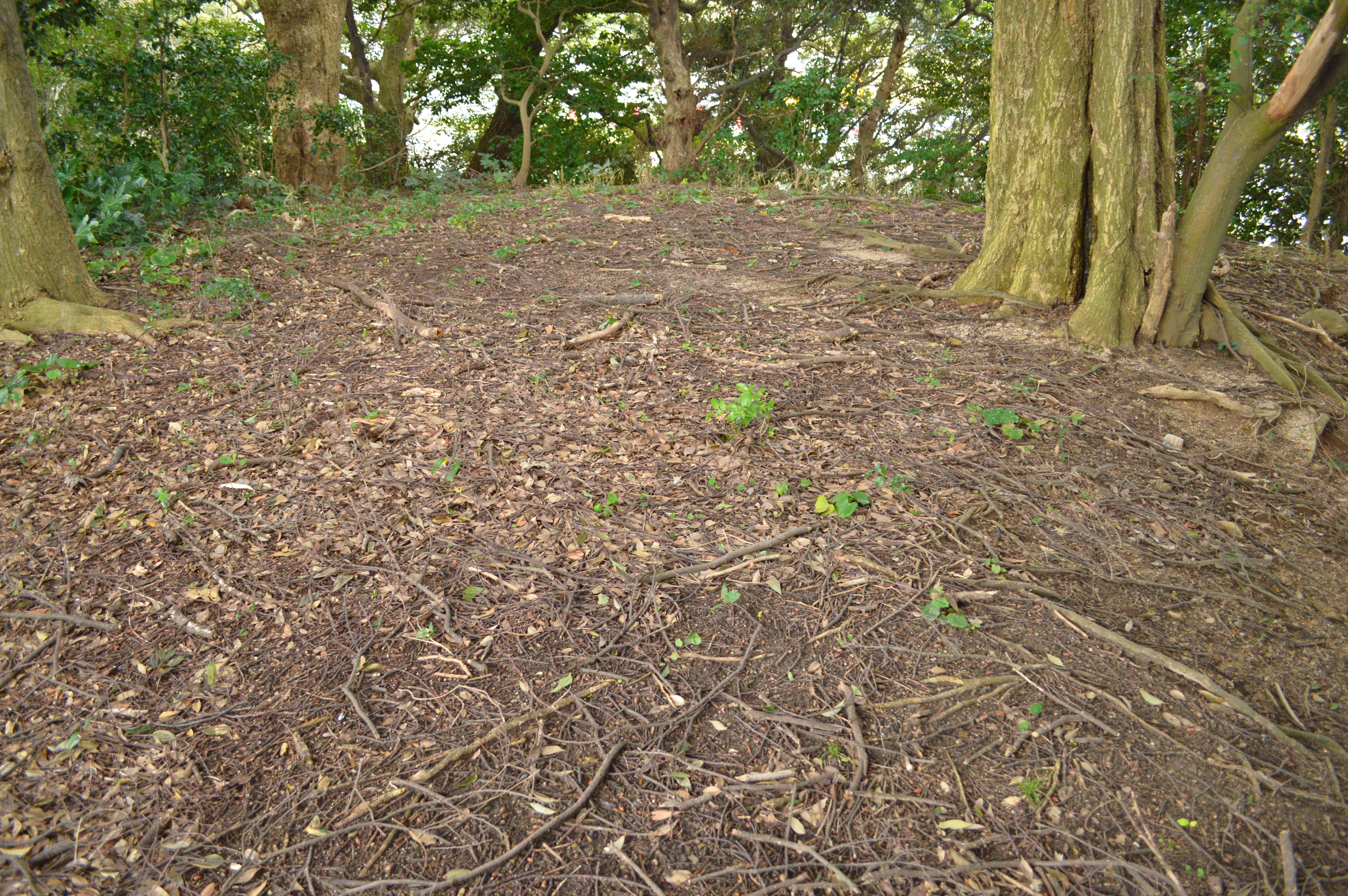 今市大念寺古墳 後円部墳頂